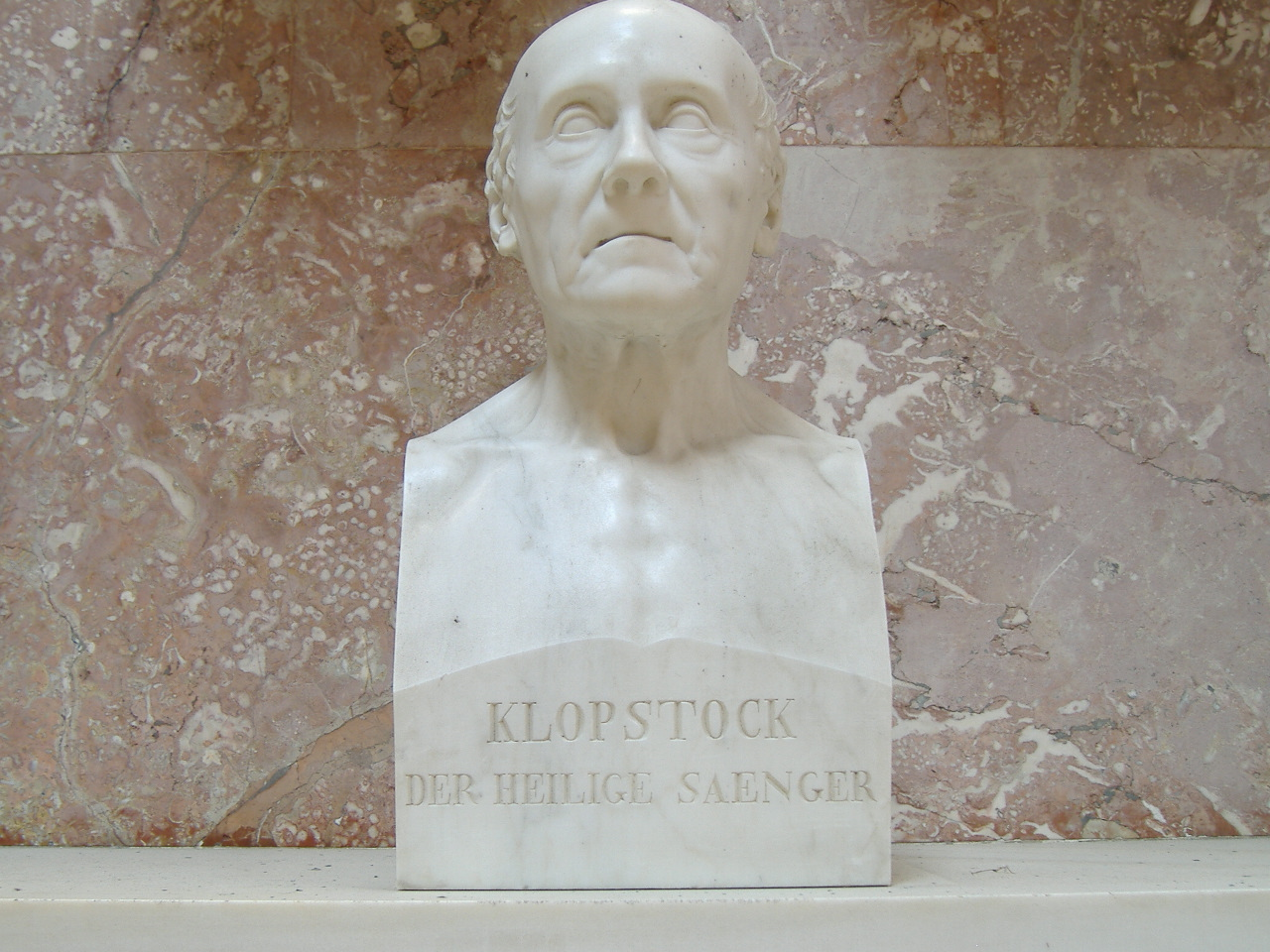 Marmorbüste Friedrich Gottlieb Klopstocks in der Walhalla